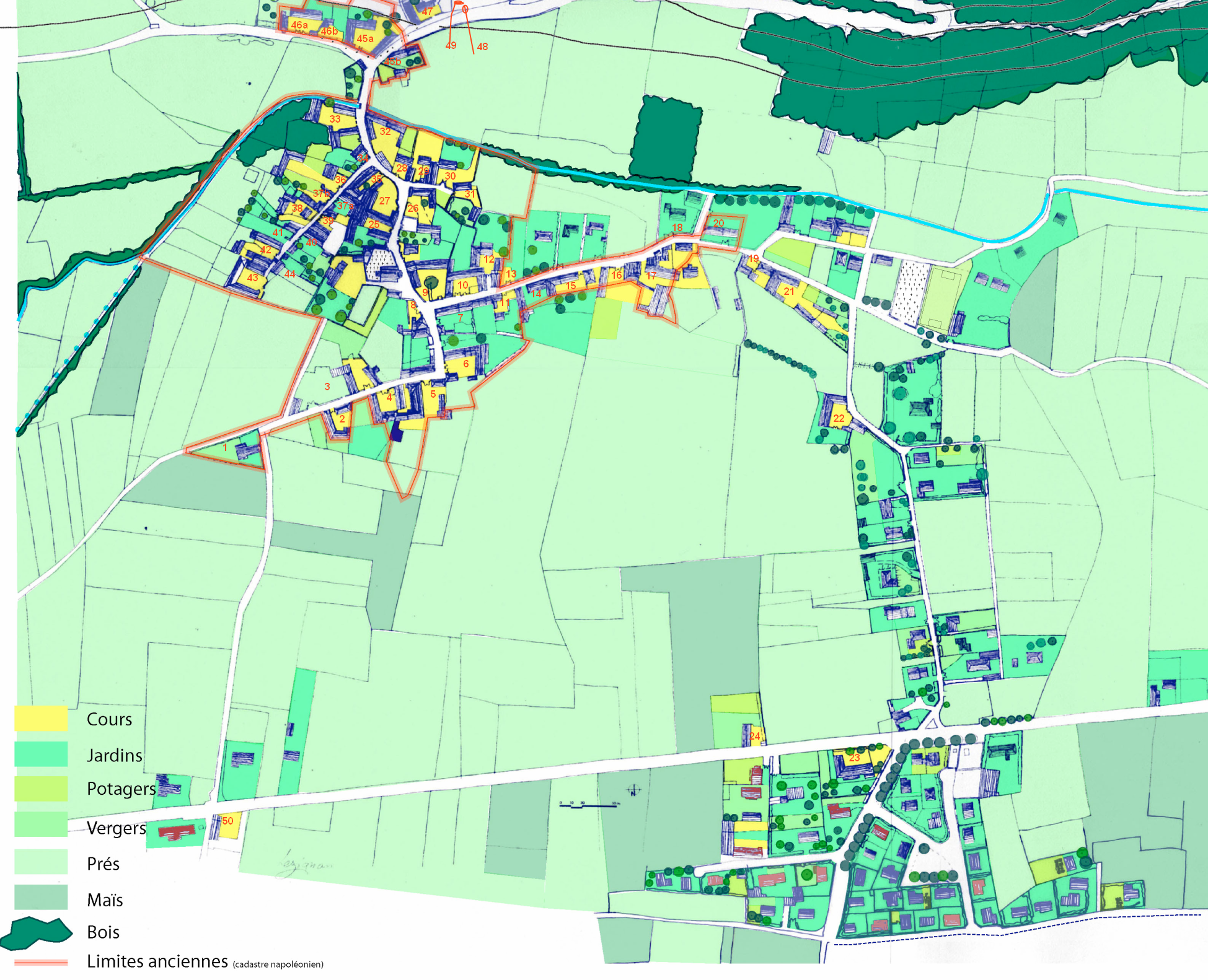 Plan de Lézignan avec mention de numéros renvoyant à un tableau fournissant les noms des maisons